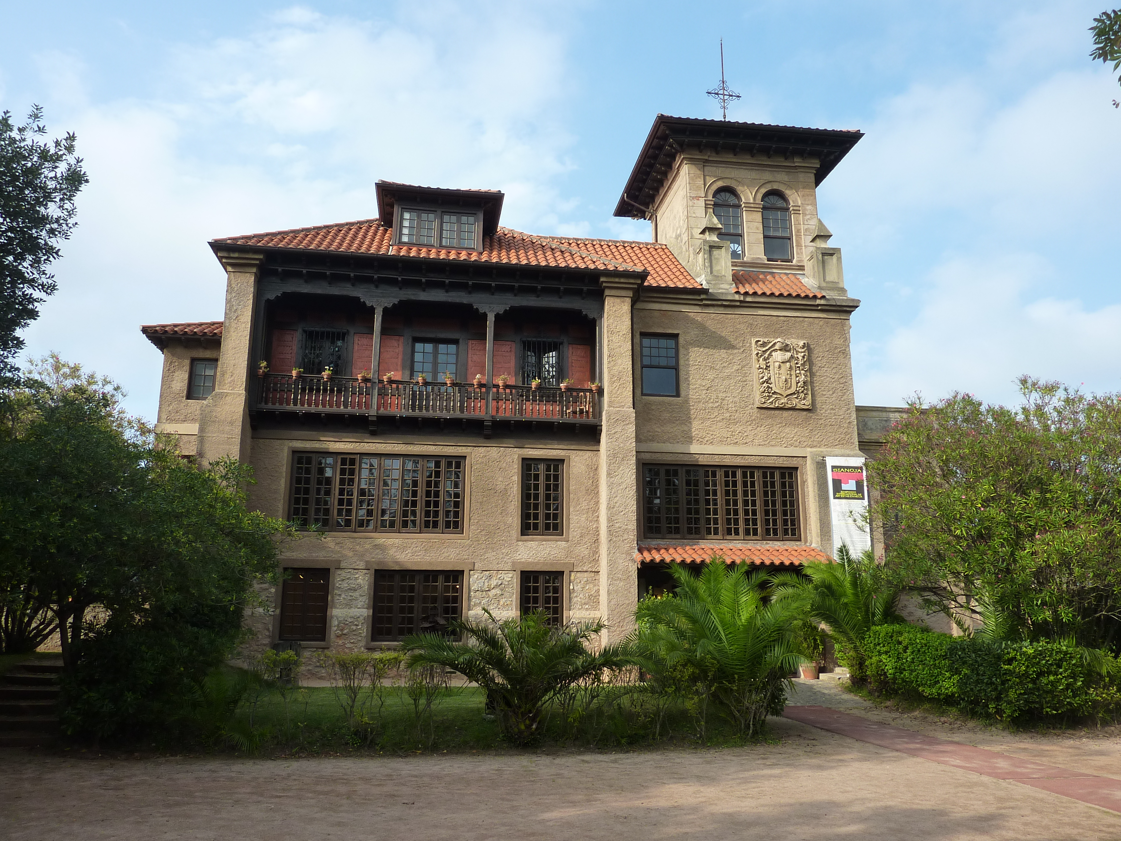 Palacio del Marques de Albaicin. (Noja-Cantabria)